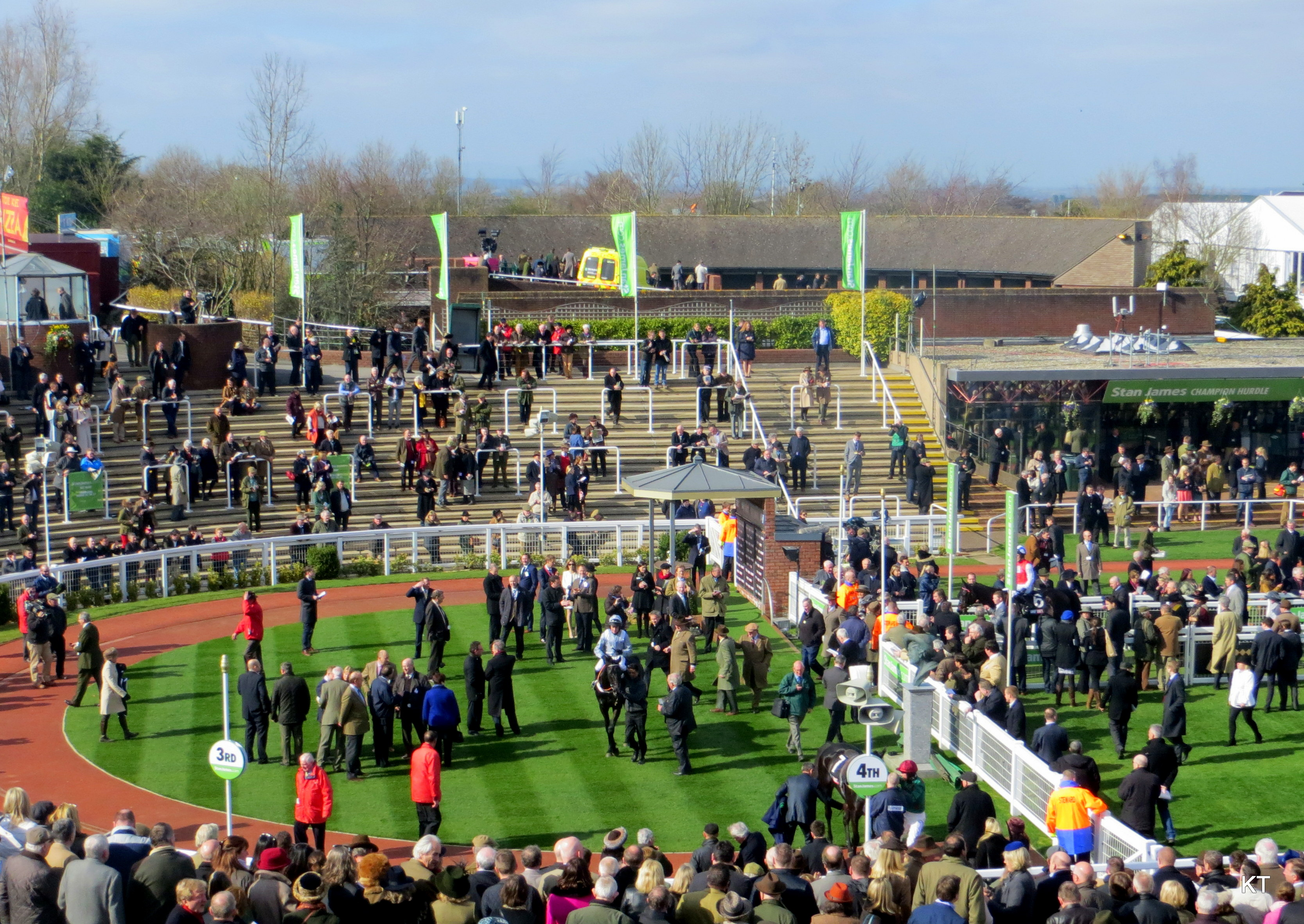 Supreme Novices' Hurdle.